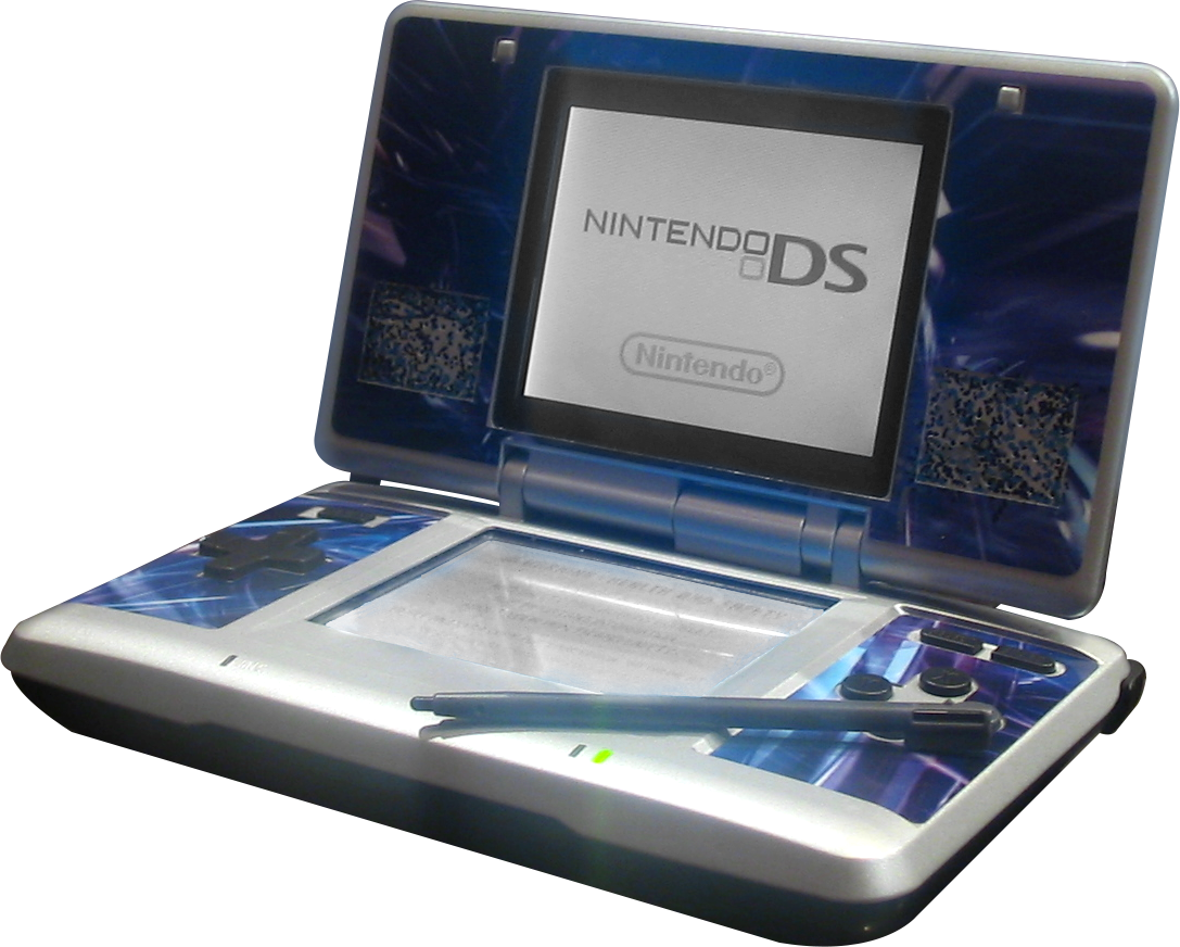 Blue skinned Nintendo DS